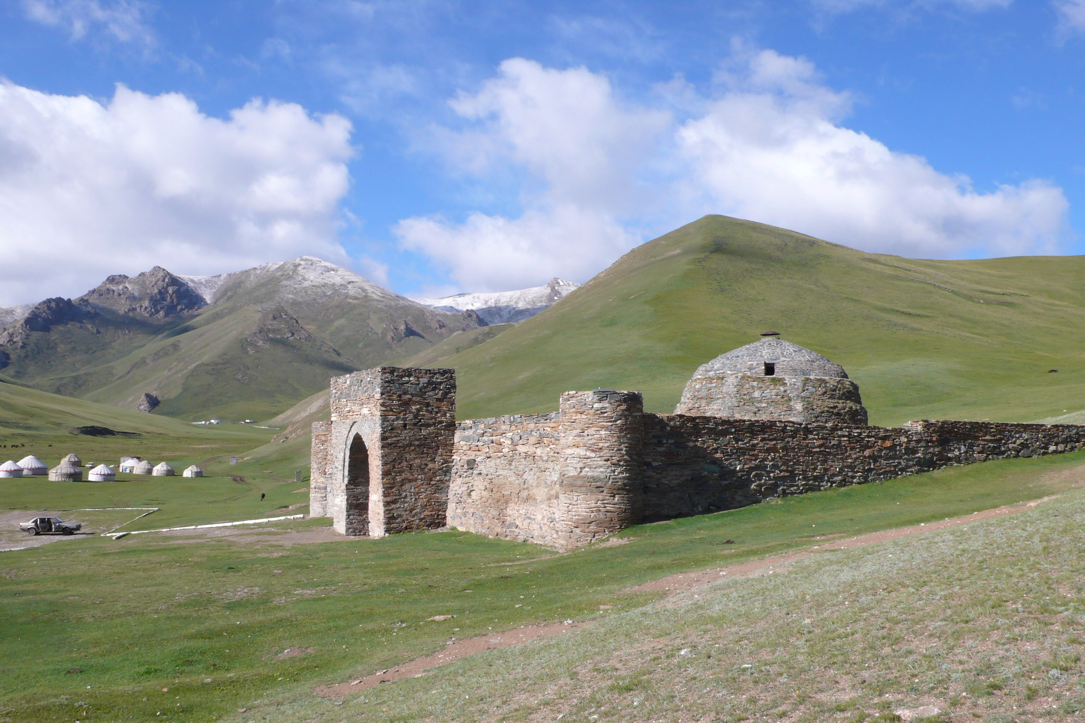 Tash Rabat (Außenansicht)